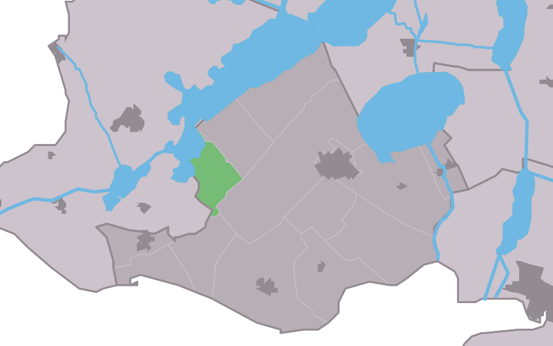 Kaartsje fan himrik fan Kolderwâlde